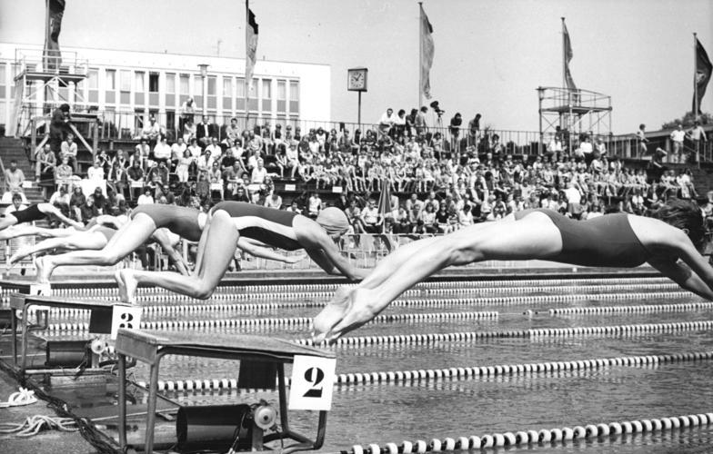 Birgit Treiber, Kerstin Kerger, Angela Franke ADN-ZB Mittelstädt 11-7-73 Berlin: 24. DDR-Meisterschaften im Sportschwimmen im Freiwasserbecken des Dynamo-Sportforums-Mit den Vorläufen über 400 m Lagen der Damen begannen die diesjährigen Titelkämpfe. Hier erfolgt der Start zum 2. Vorlauf. Im Vordergrund Birgit Treiber (SC Einheit Dresden). Dahinter Kerstin Kerger und halb verdeckt die Siegerin dieses Vorlaufes, Angela Franke (5:14,13 min-beide SC Magdeburg).